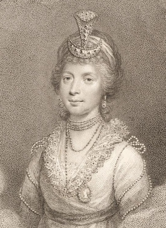 Portrait of Charlotte of Mecklenburg-Strelitz (1744-1818)